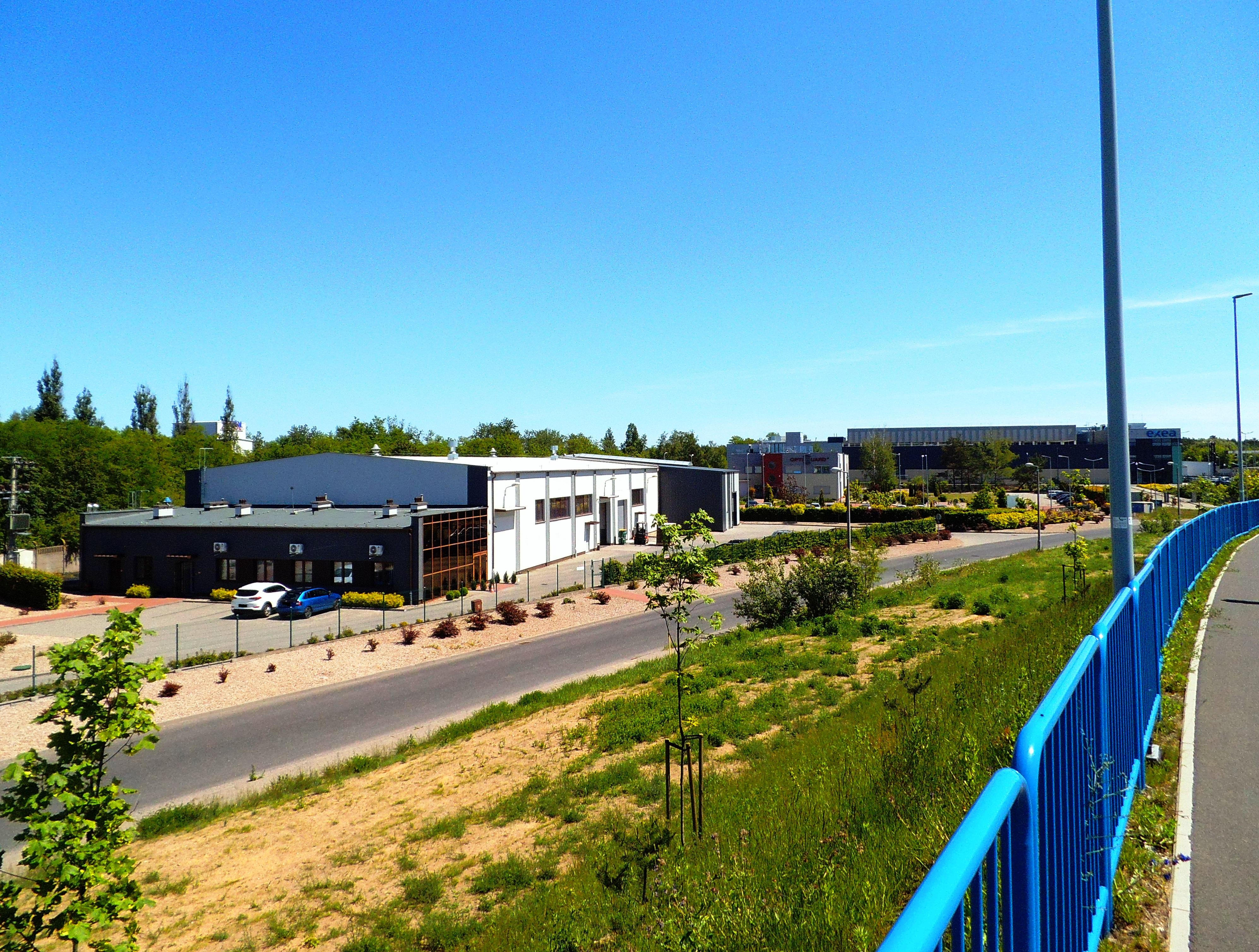 Toruński Park Technologiczny